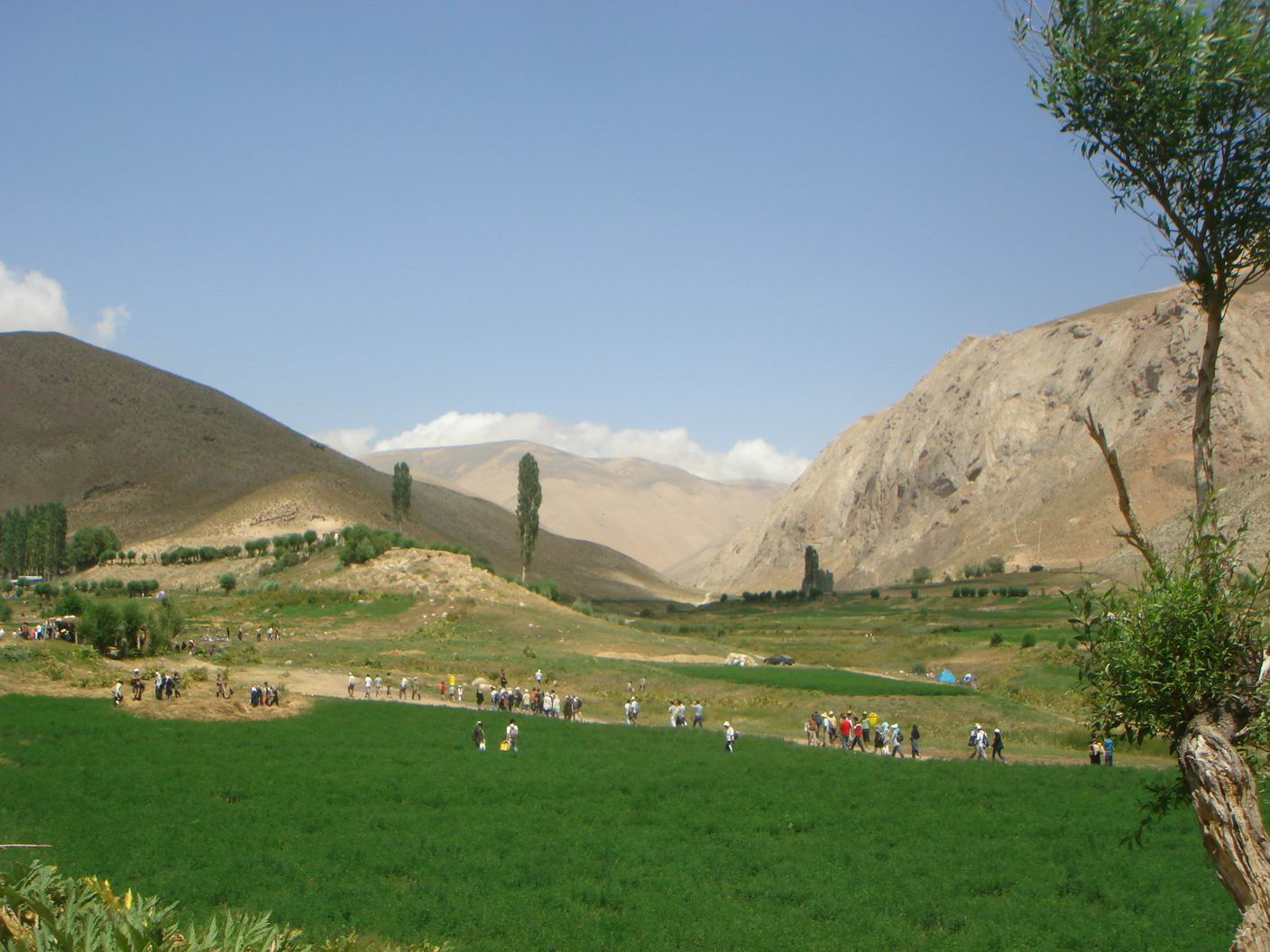 علی افضلی AliAfzali1985 ۱۵:۴۹، ۲۱ سپتامبر ۲۰۰۷ (UTC)